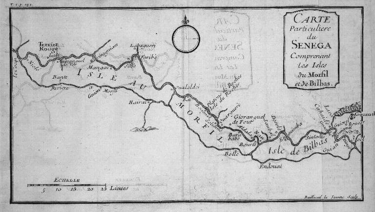 Carte de l'île au Morfil (Sénégal) : illustration dans Nouvelle relation de l'Afrique occidentale, contenant une description exacte du Sénégal et des pays situés entre le Cap-Blanc et la rivière de Serre-Lionne, jusqu'à plus de 300 lieues en avant dans les terres, l'histoire naturelle de ces pays, les différentes nations qui y sont répandues, leurs religions et leurs moeurs, avec l'état ancien et présent des compagnies qui y font le commerce... de Jean-Baptiste Labat